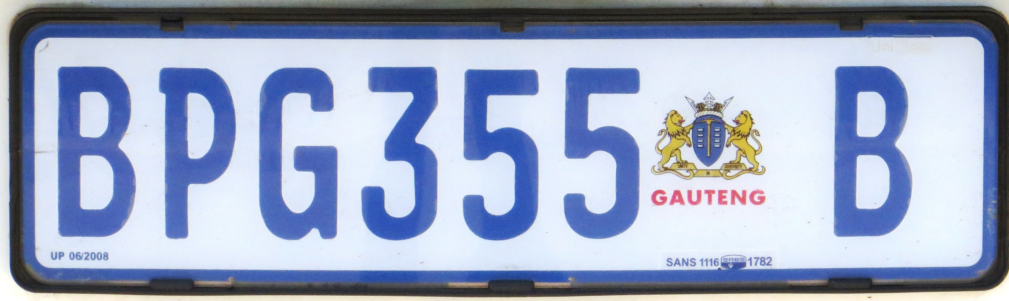 Kentekenplaat Gauteng